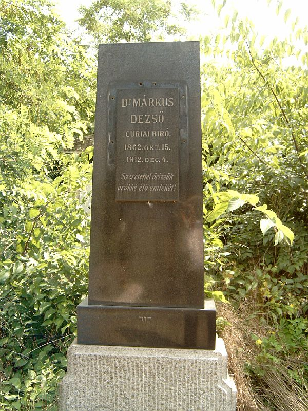 Márkus Dezső (Paks, 1862, okt. 13. – Bp., 1912. dec. 3. ): jogi író sírja Budapesten. Kozma utcai izraelita temető: 5-1-20.